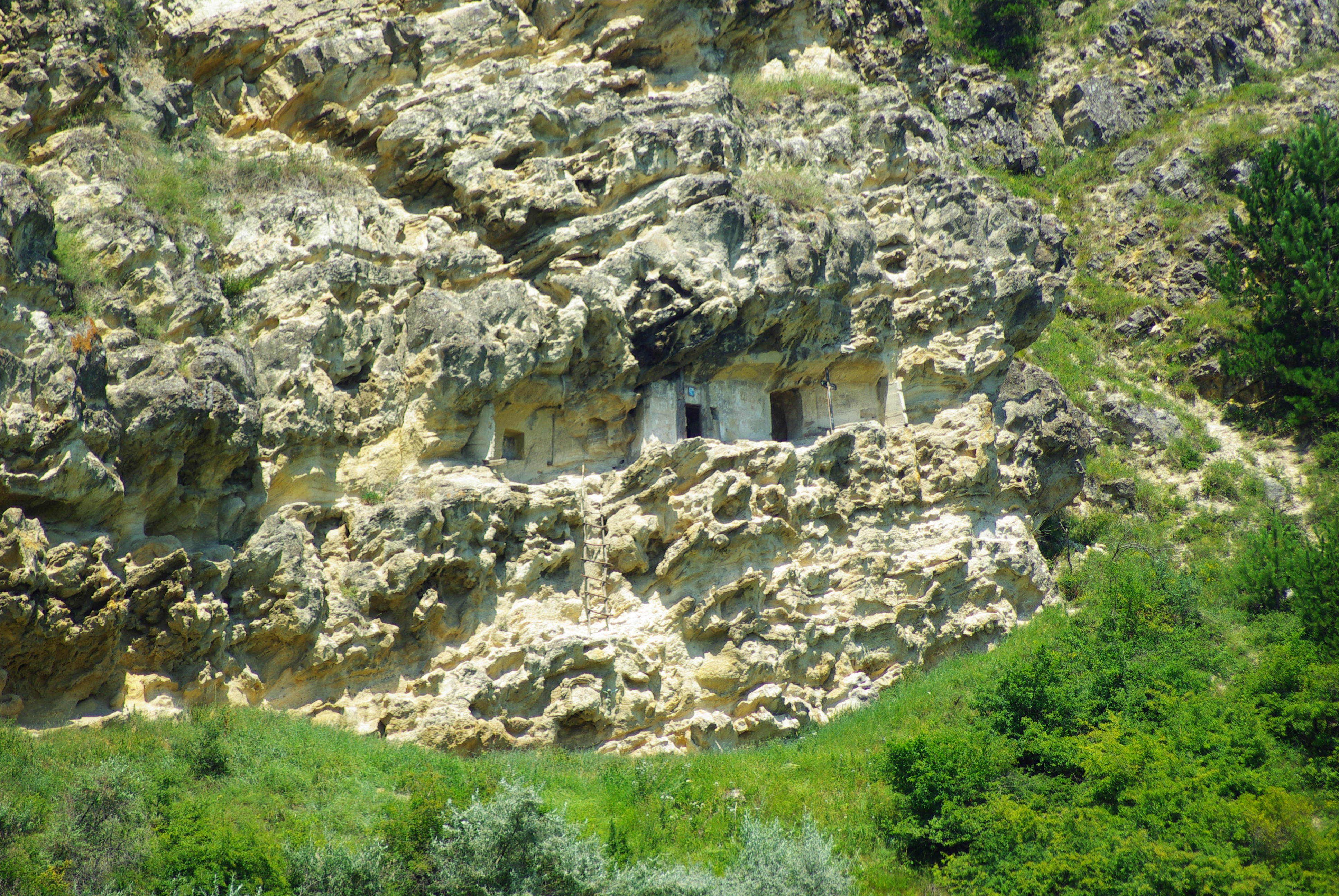 Locuință rupestră 01